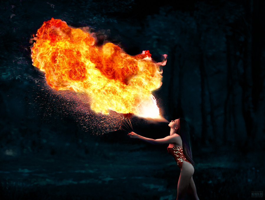 photo: Svetlana B